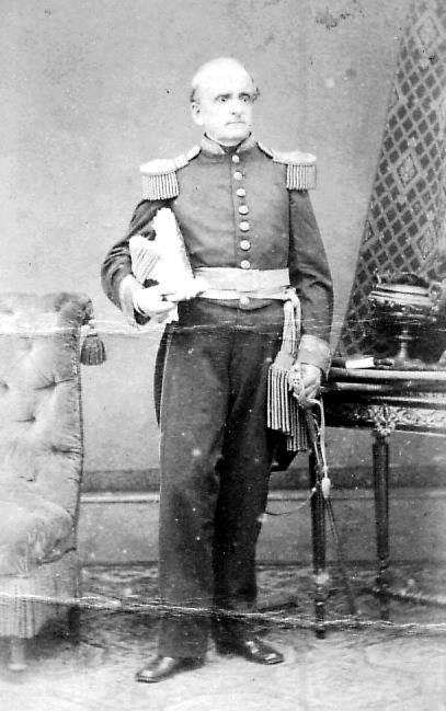 Manuel de Mendiburu Bonet (1805 - 1885) militar, político e historiador peruano.